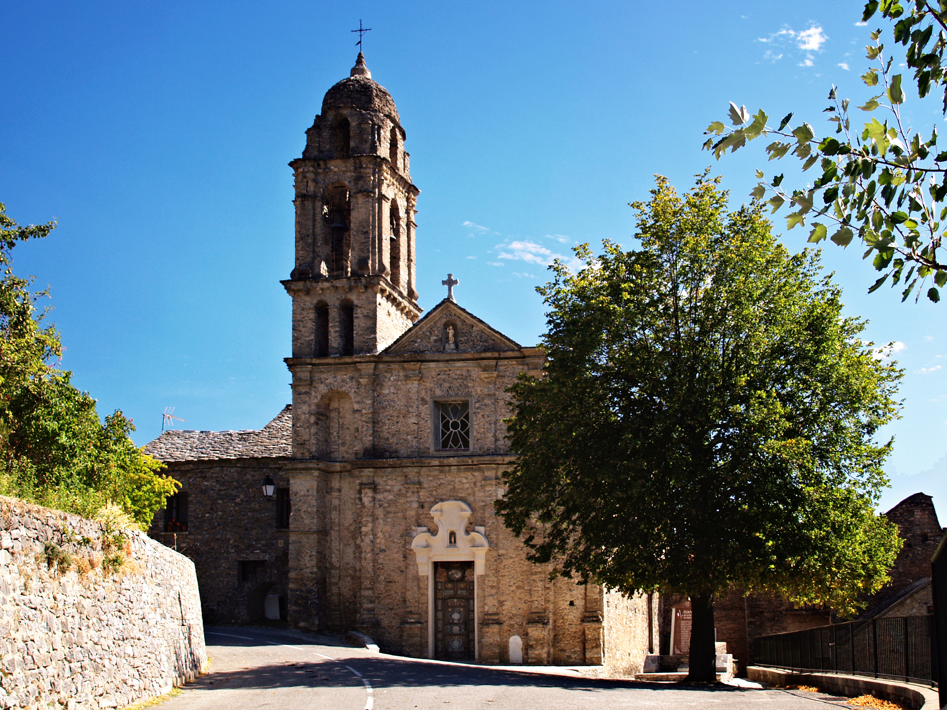 Zuani (Corsica) - Église paroissiale Sainte-Marie